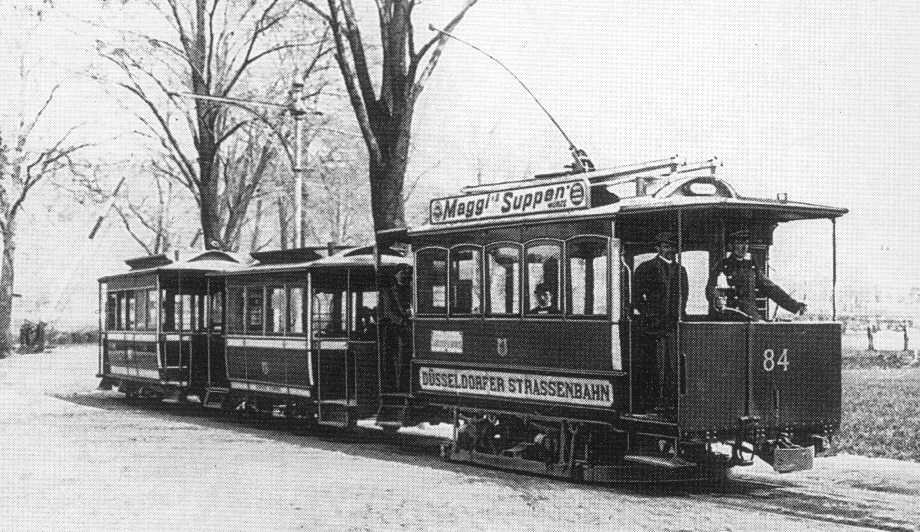 Elektrische Straßenbahn am Grafenberger Staufenplatz im Jahre 1901